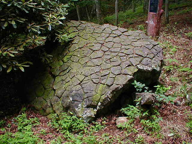 三国山の亀甲岩